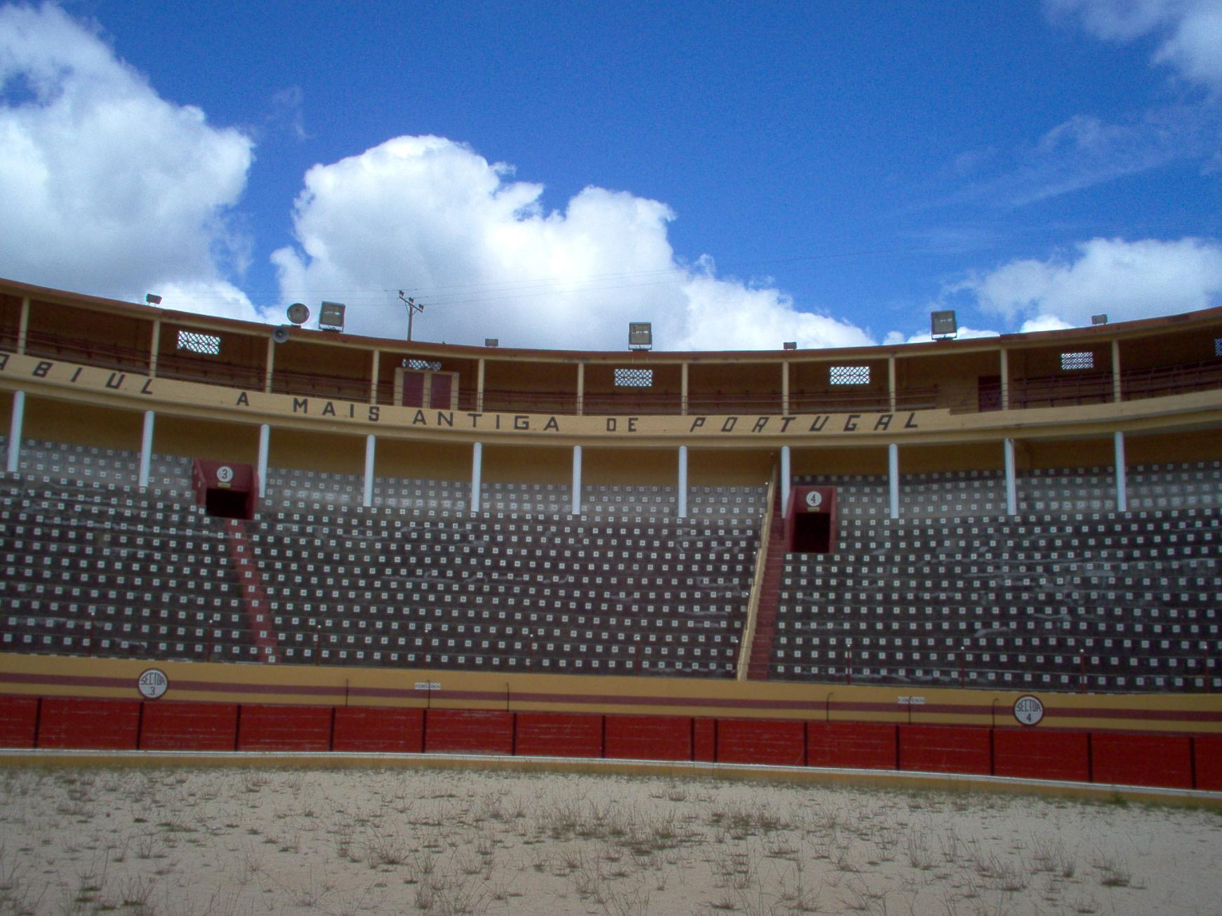 Praça de touros, 2005, Abiul This file was uploaded for Wiki Loves Monuments in Portugal with the unique identifier 97027514.